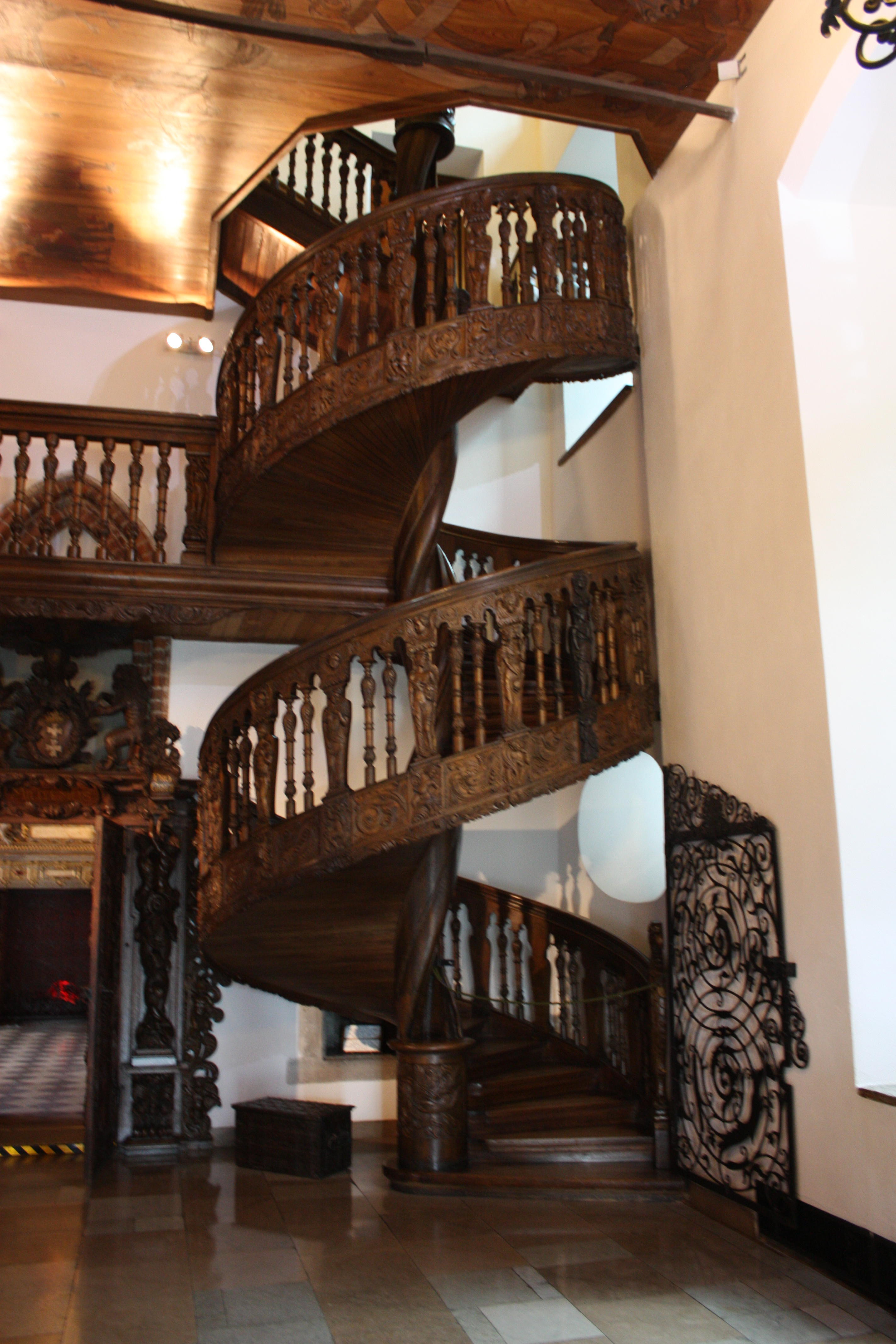 Gdańsk, ratusz Głównego Miasta, ob. Muzeum Historyczne, 1378-XV